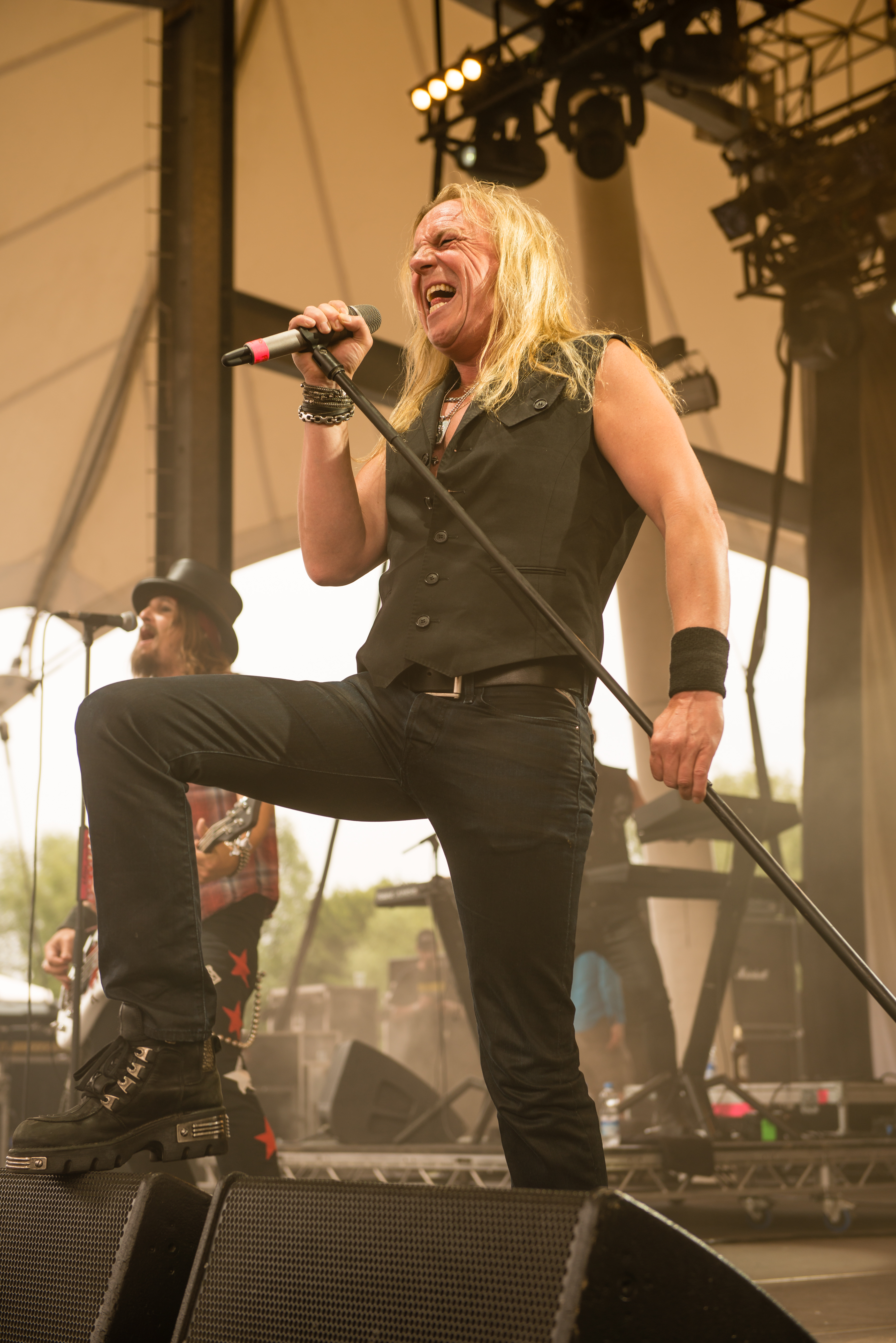 'Rock Hard Festival 2014 - Gelsenkirchen': 'Pretty Maids'